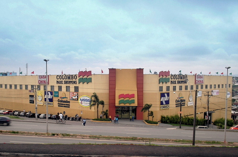 Colombo Park Shopping, em Colombo, município da Grande Curitiba, Paraná, Sul do Brasil.